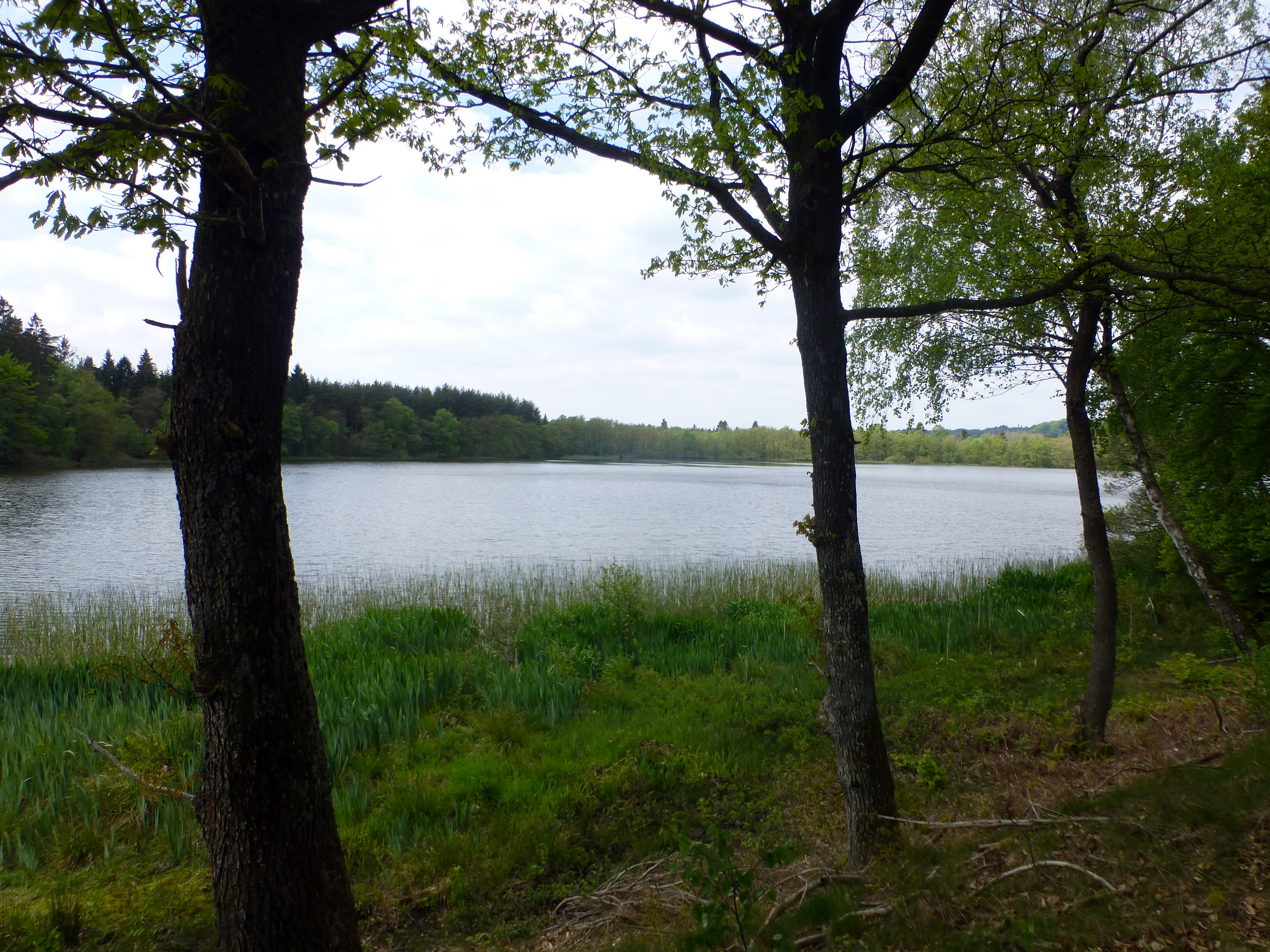 Sydvestenden af Salten Langsø set fra Addit Næs